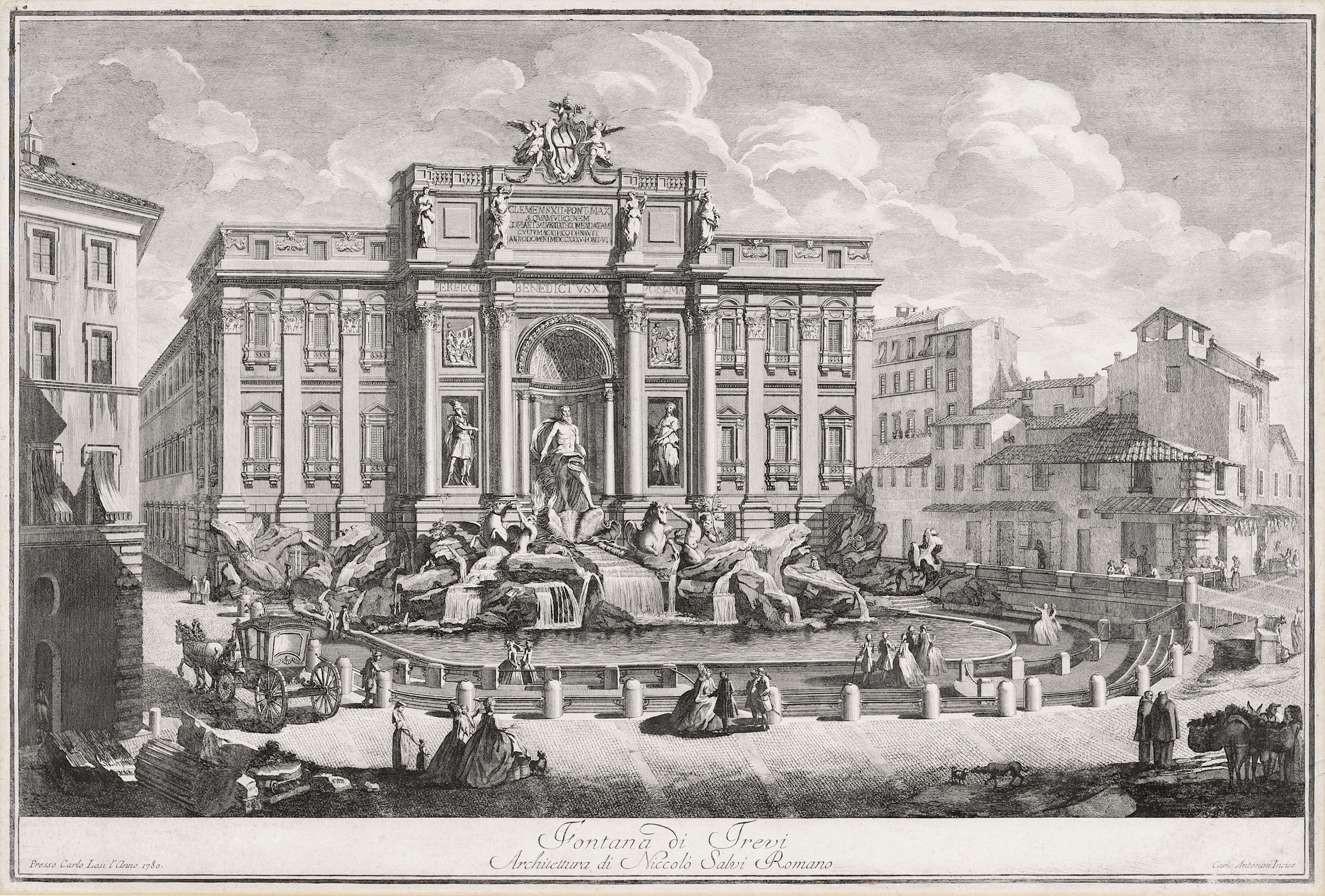 Roma, Fontana di Trevi